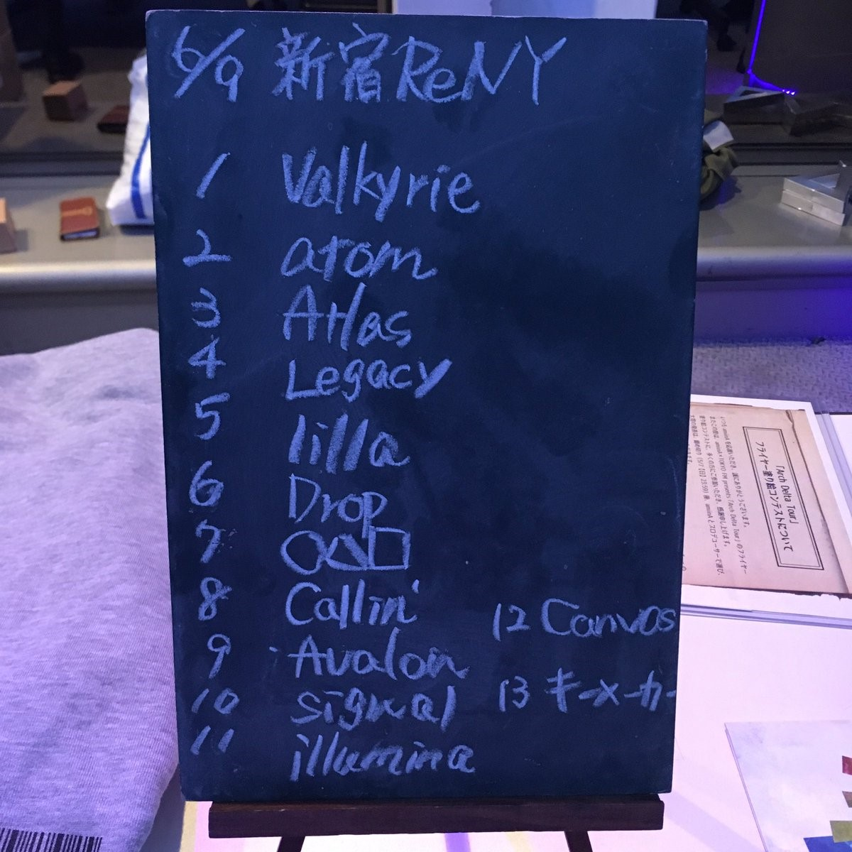 amiinAセトリボード(20170609(1))